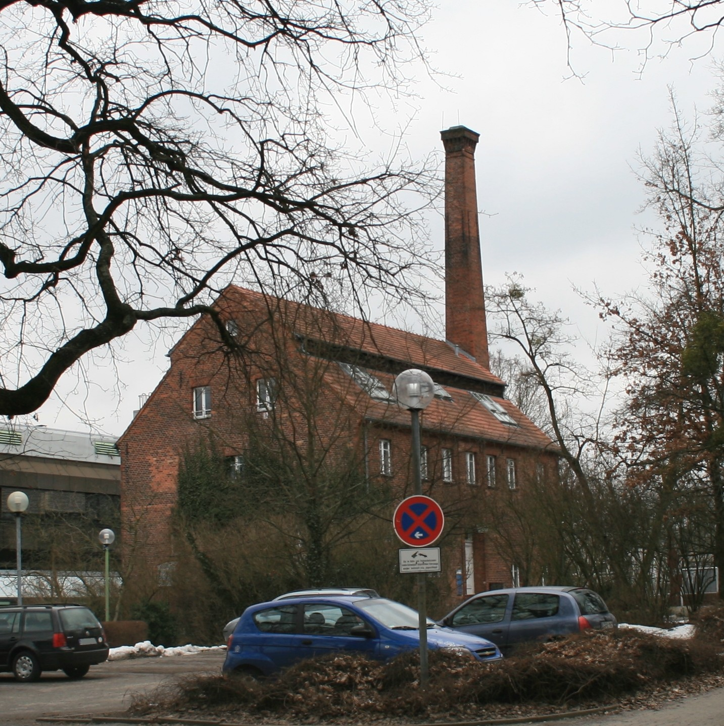 Berlin-Zehlendorf, Königsweg 50 Brennerei. Rittergut Düppel.